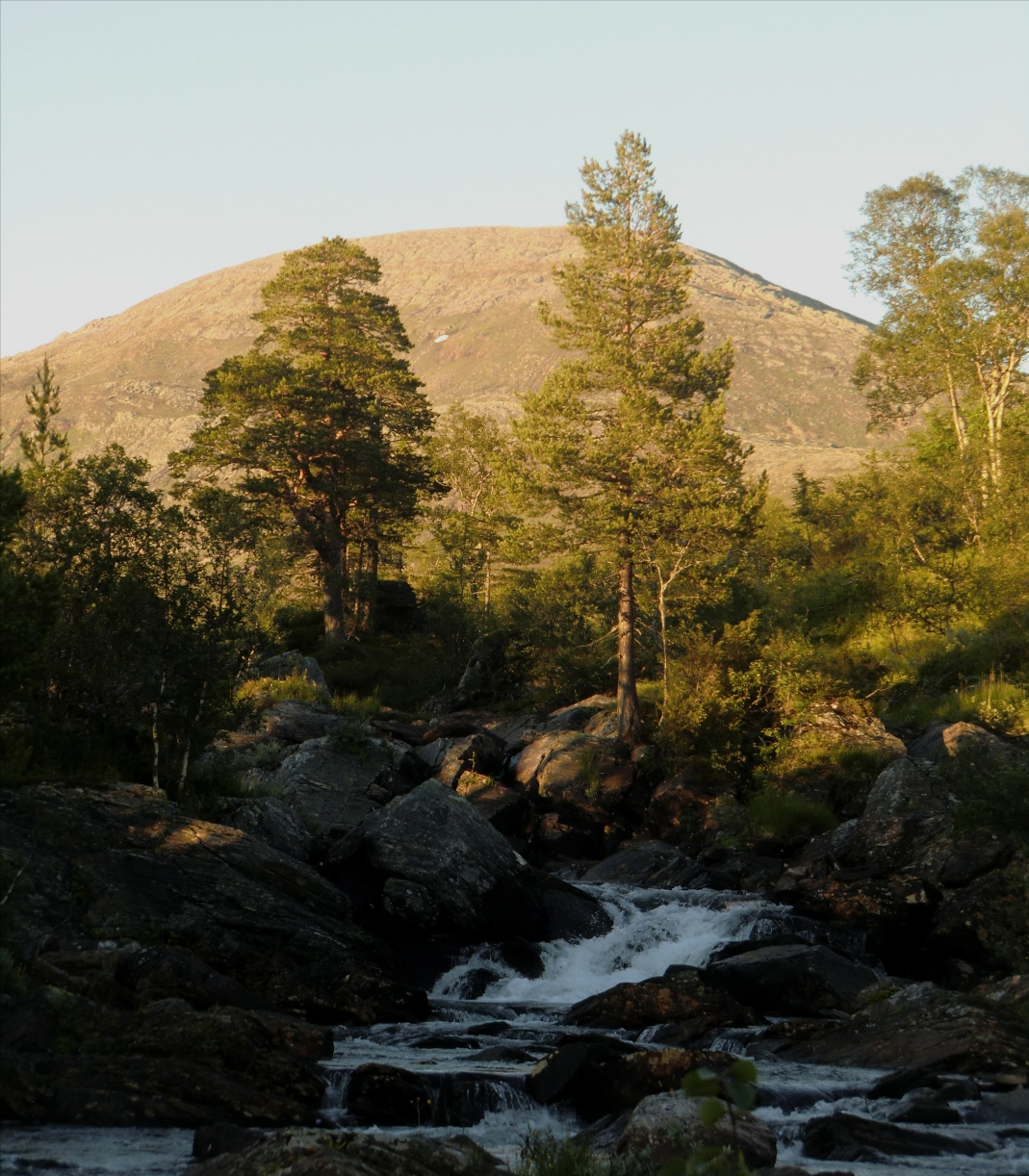 Skjækerhatten